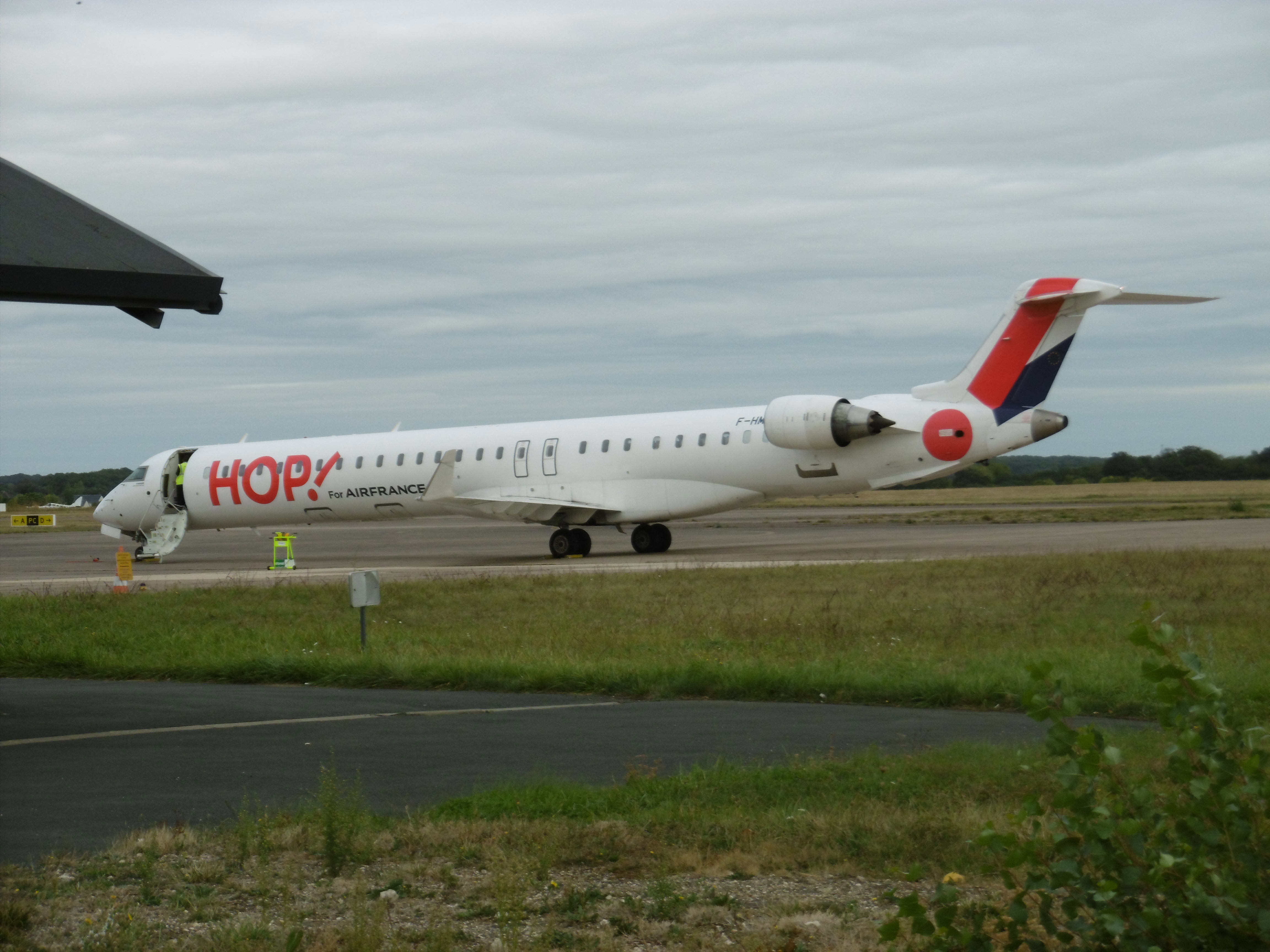 CRJ-1000 DE HOP!